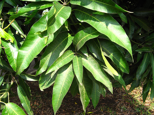 folhagem